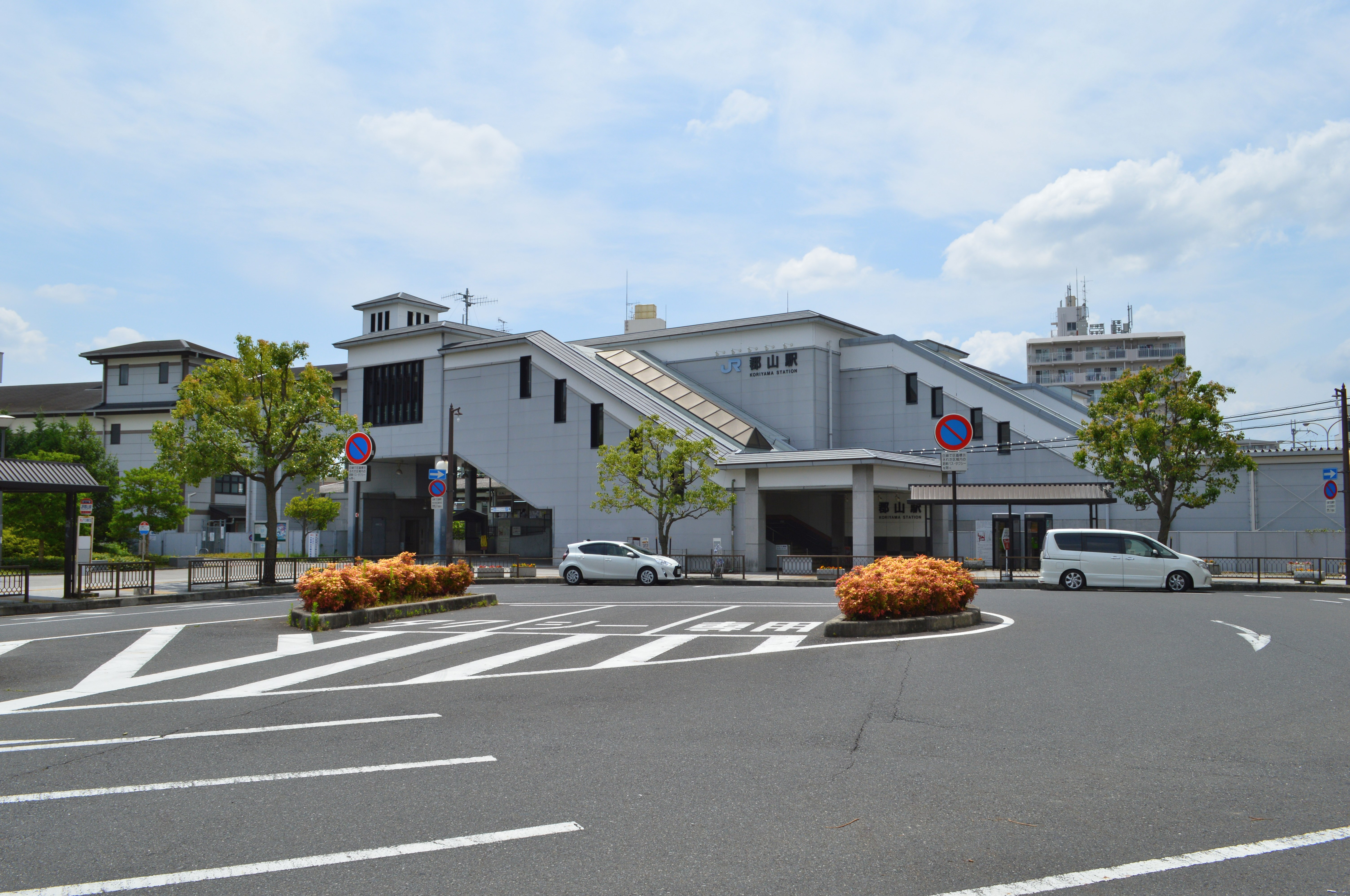 郡山駅 (奈良県) 駅舎